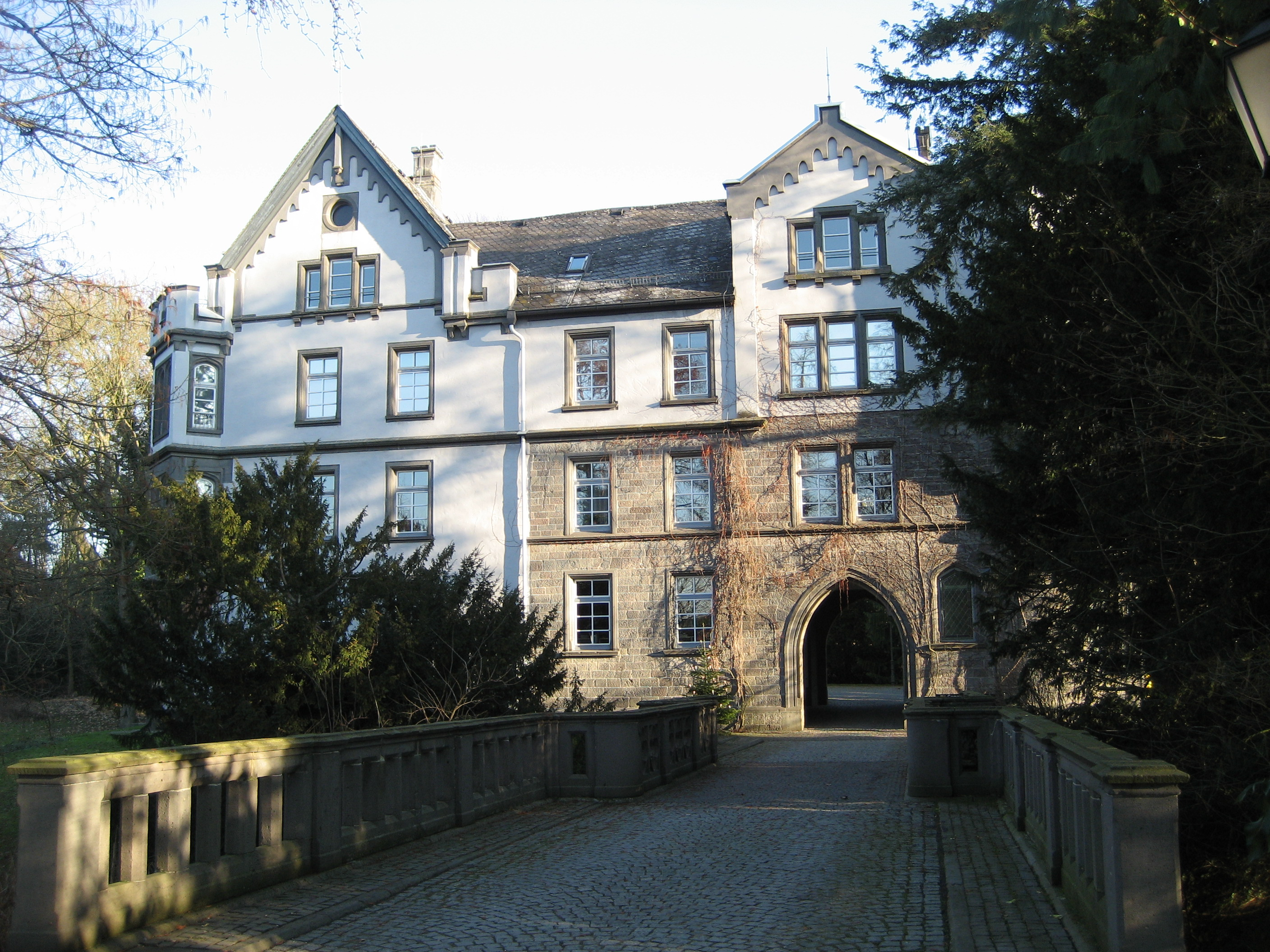 Busecker Schloß. Freiin Ernestine von Nordeck zur Rabenau geb. von Zwierlein, die 1829 Freiherr Friedrich von Nordeck zur Rabenau heiratete, ließ1860 das Schlossgebäude im jetzigen neugotischen Stil erbauen und ersuchte auch das Großherzogtum Hessen um unentgeltliche Verwandlung ihres Lehens zu Großen-Buseck in freies Eigentum. Die Gemeinde erwarb 1976 das Schloss nebst Park und Gutshof. Zwei Jahre später fiel (nach Bildung der Gemeinde Buseck durch die Gebietsreform in Hessen am 1. Januar 1977) der Beschluss zum Erhalt von Schloss und Park und nach umfangreichen Restaurierungsarbeiten konnte 1981 die Gemeindeverwaltung einziehen.